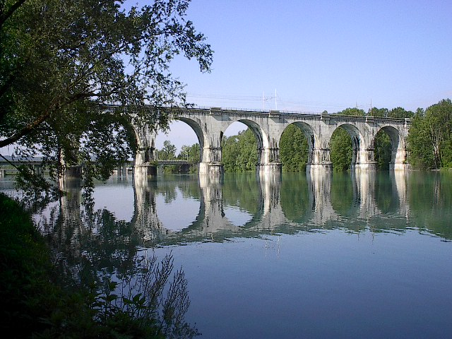 Uno scorcio del Fiume Isonzo con il ponte della Ferrovia, nei pressi di Gorizia